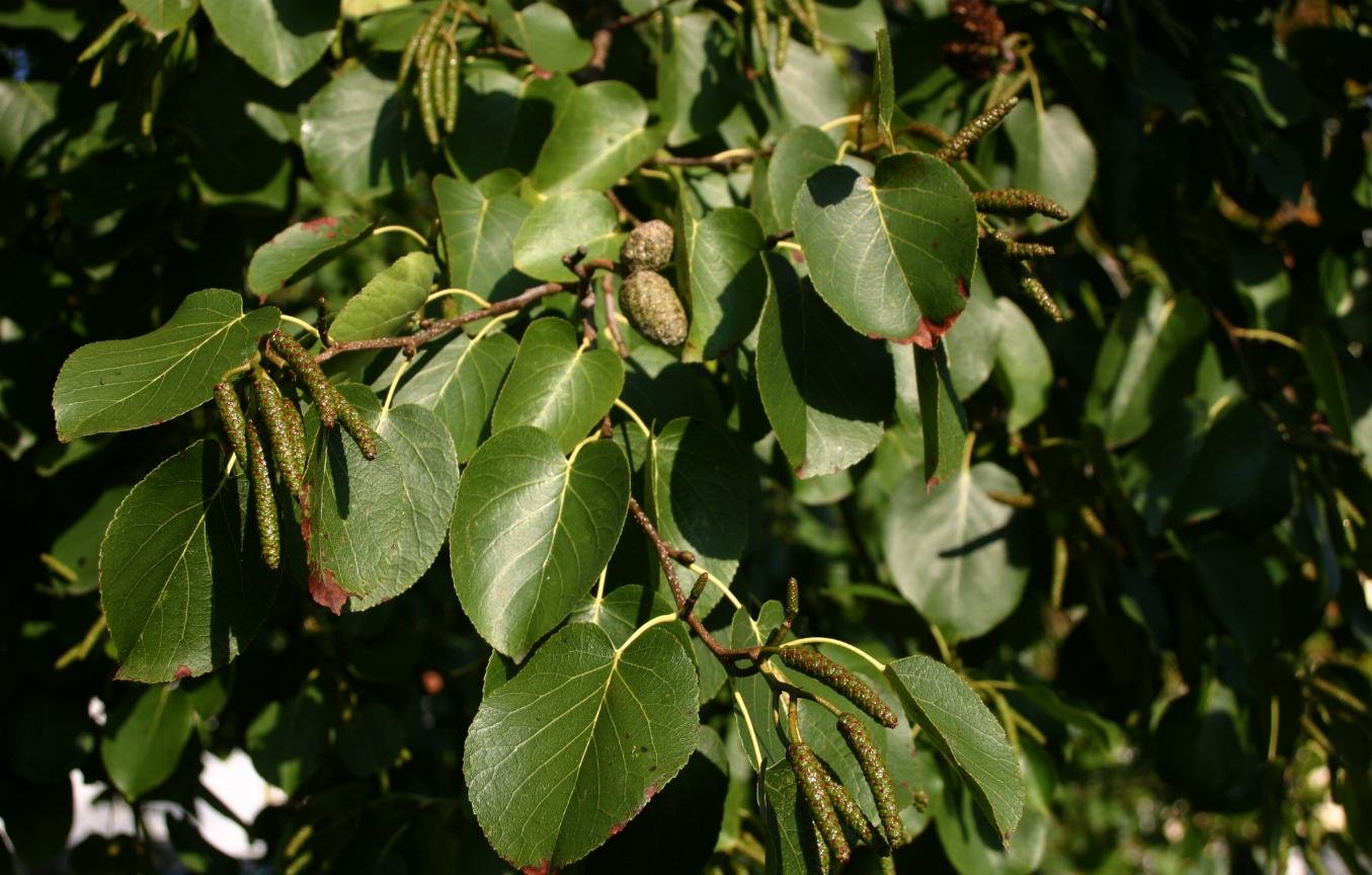 Alnus cordata: Leaves.